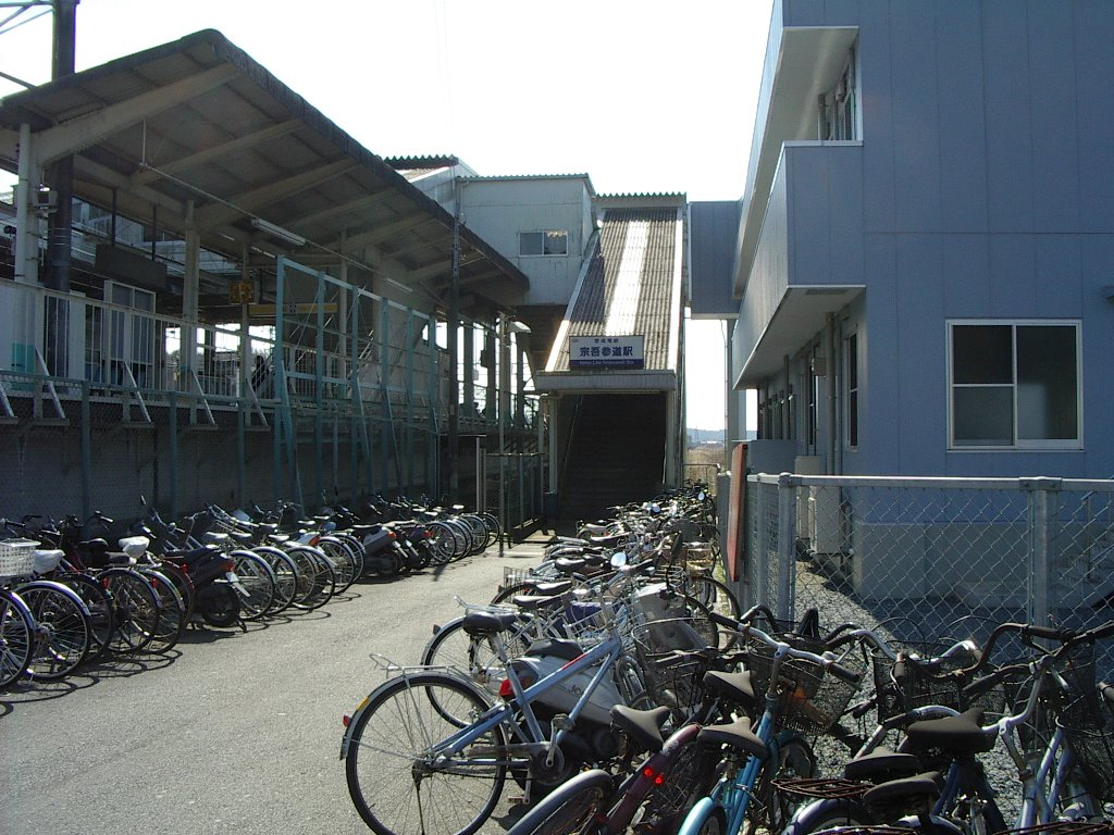 京成電鉄本線宗吾参道駅